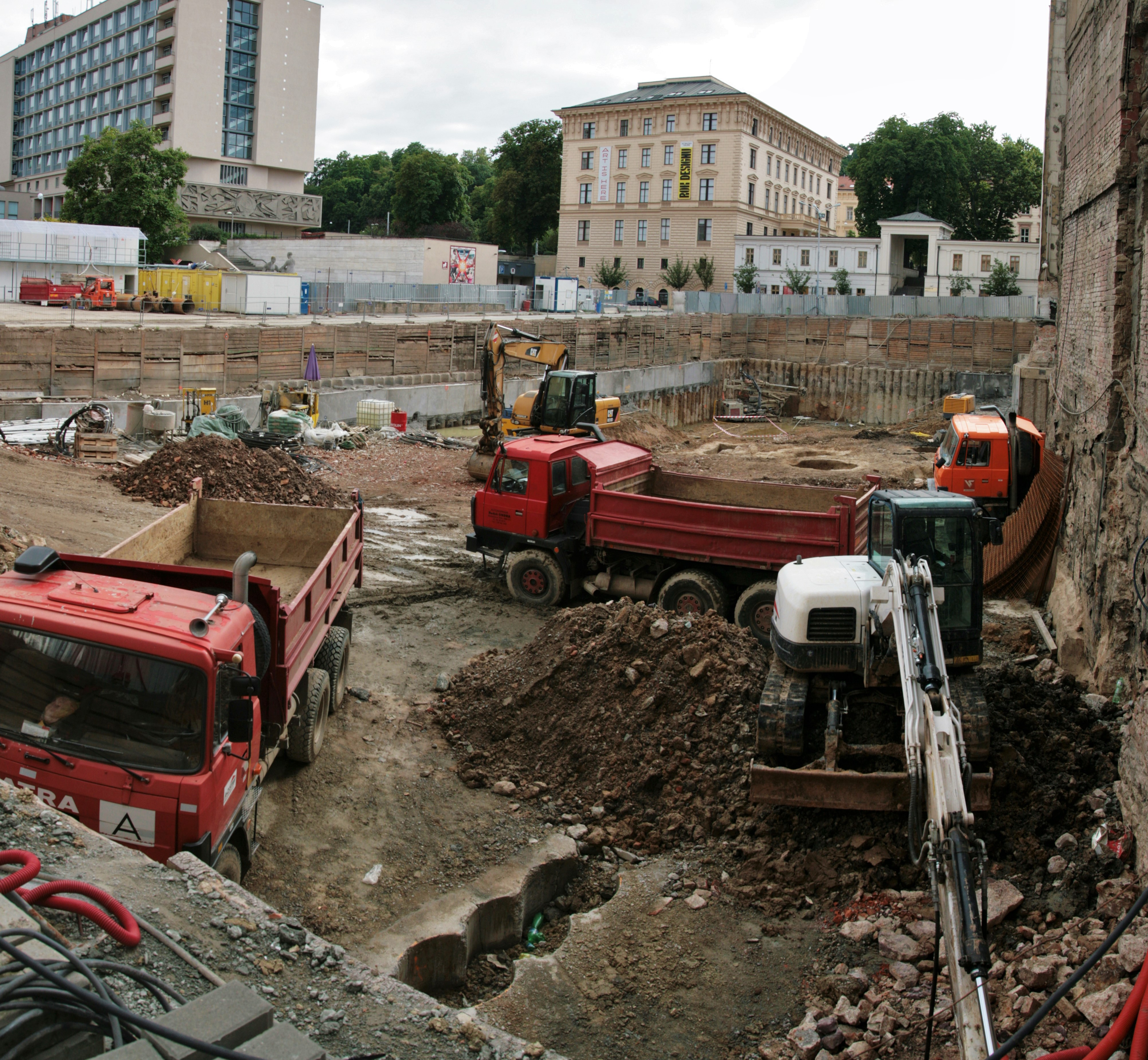 Stavba podzemních garáží na ulicích Besední a Veselá v Brně-střed, označená za 1. etapu výstavby Janáčkova kulturního centra Brno. Stav v červenci 2016, pohled z Veselé ulice.